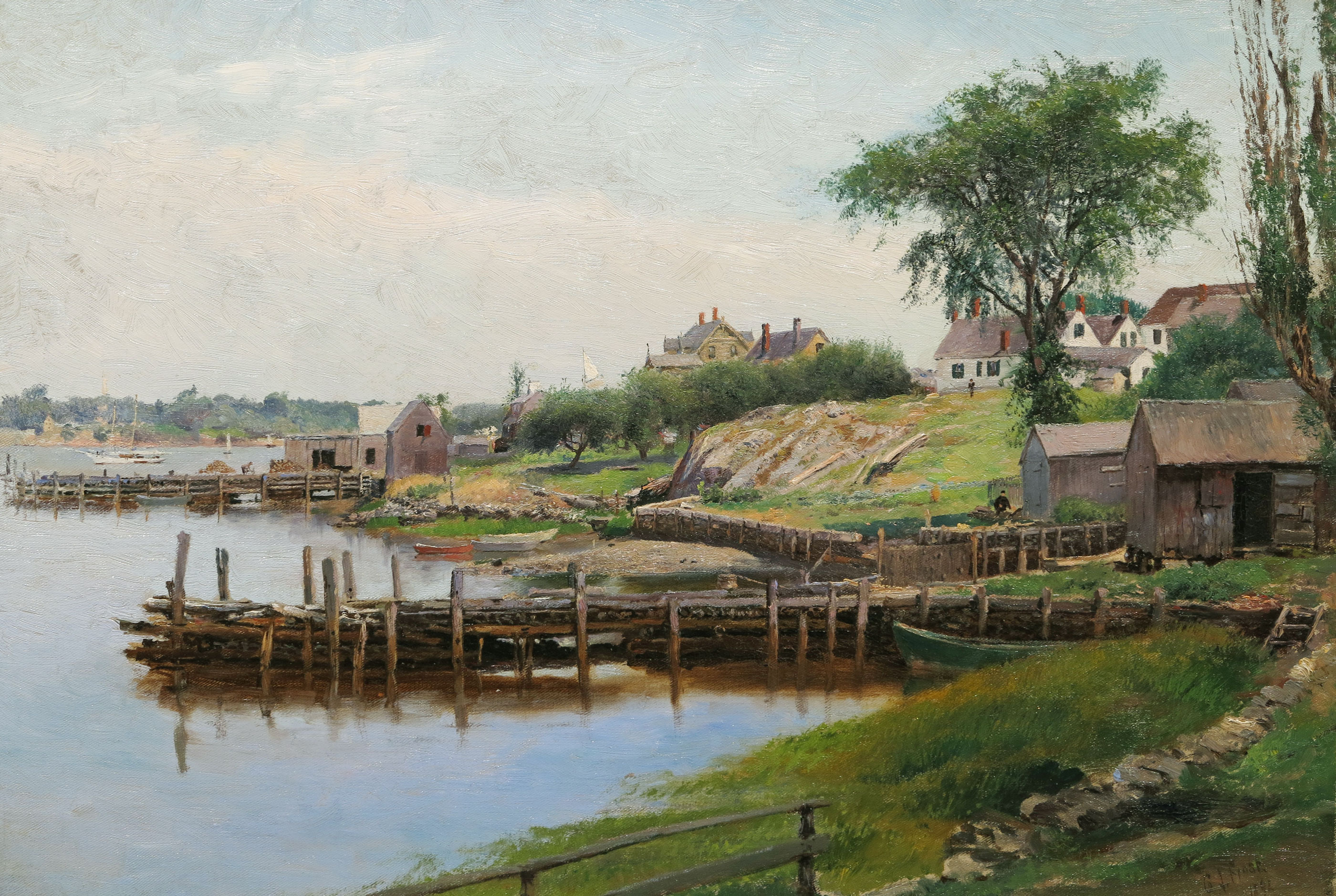 Inner Harbor, New Castle, New Hampshire, Öl auf Leinwand, 16 x 24 inches